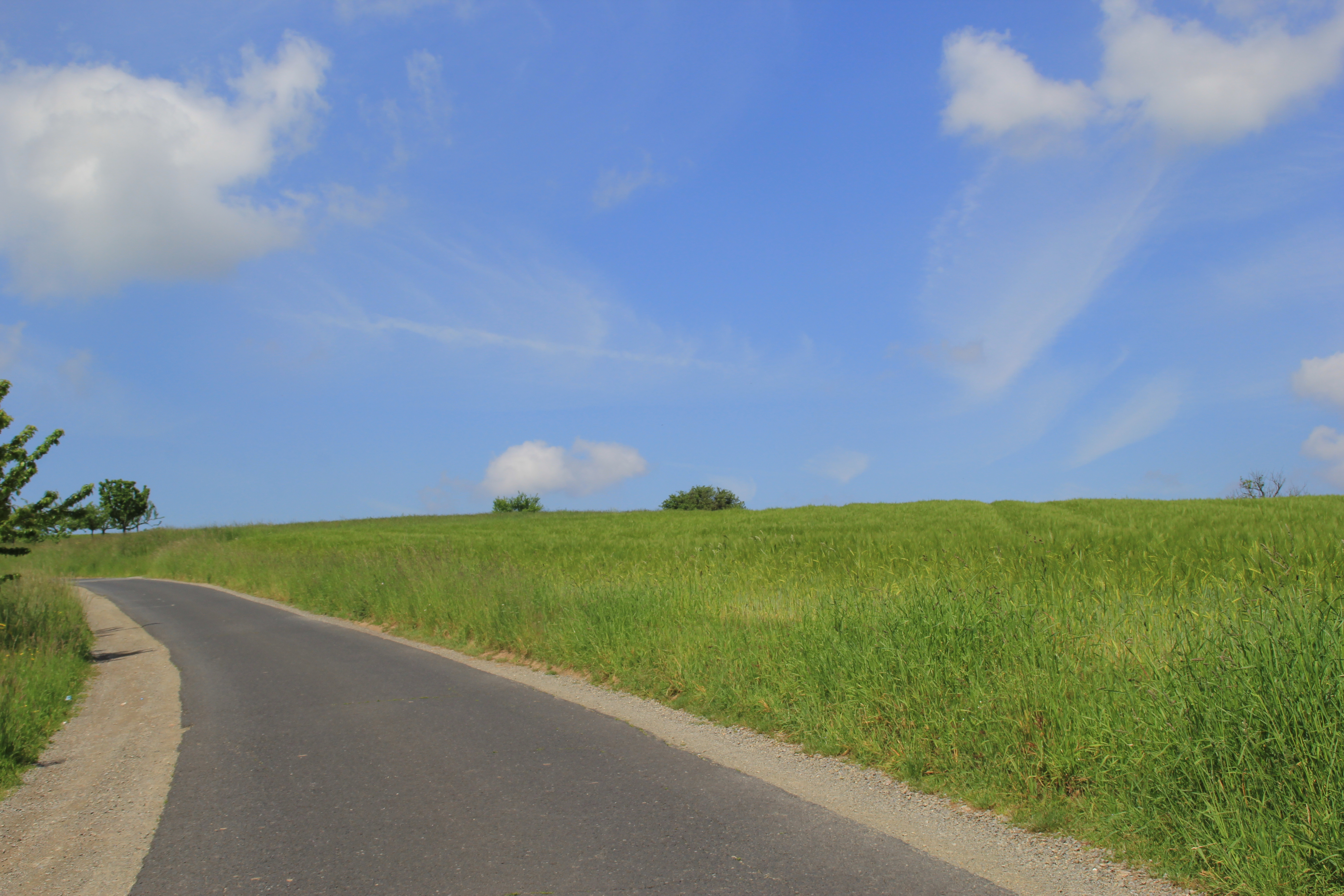 Am Gipfel des Steinberges bei Mömbris, Lkr. Aschaffenburg, Bayern